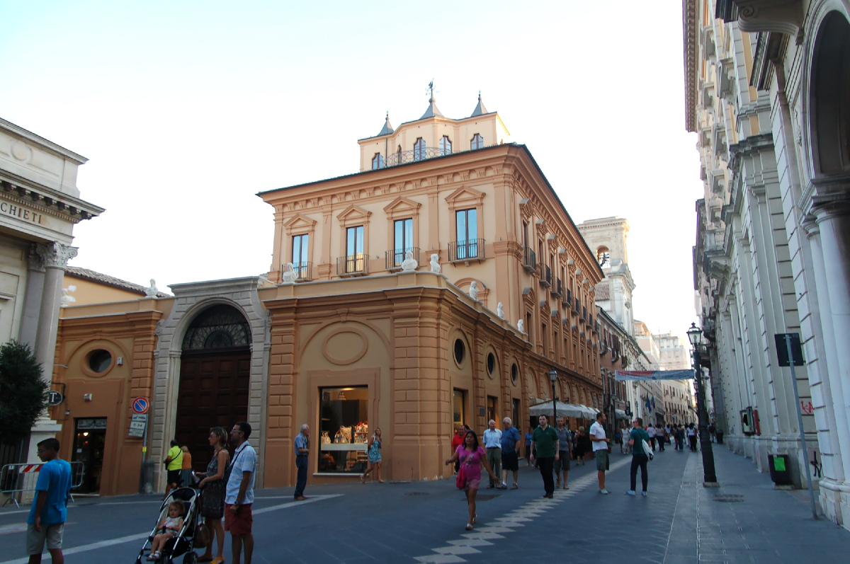 Palazzo de' Mayo (aus dem 16. Jahrhundert), heute Sitz des Museums der Stiftung "Carichieti". 2011